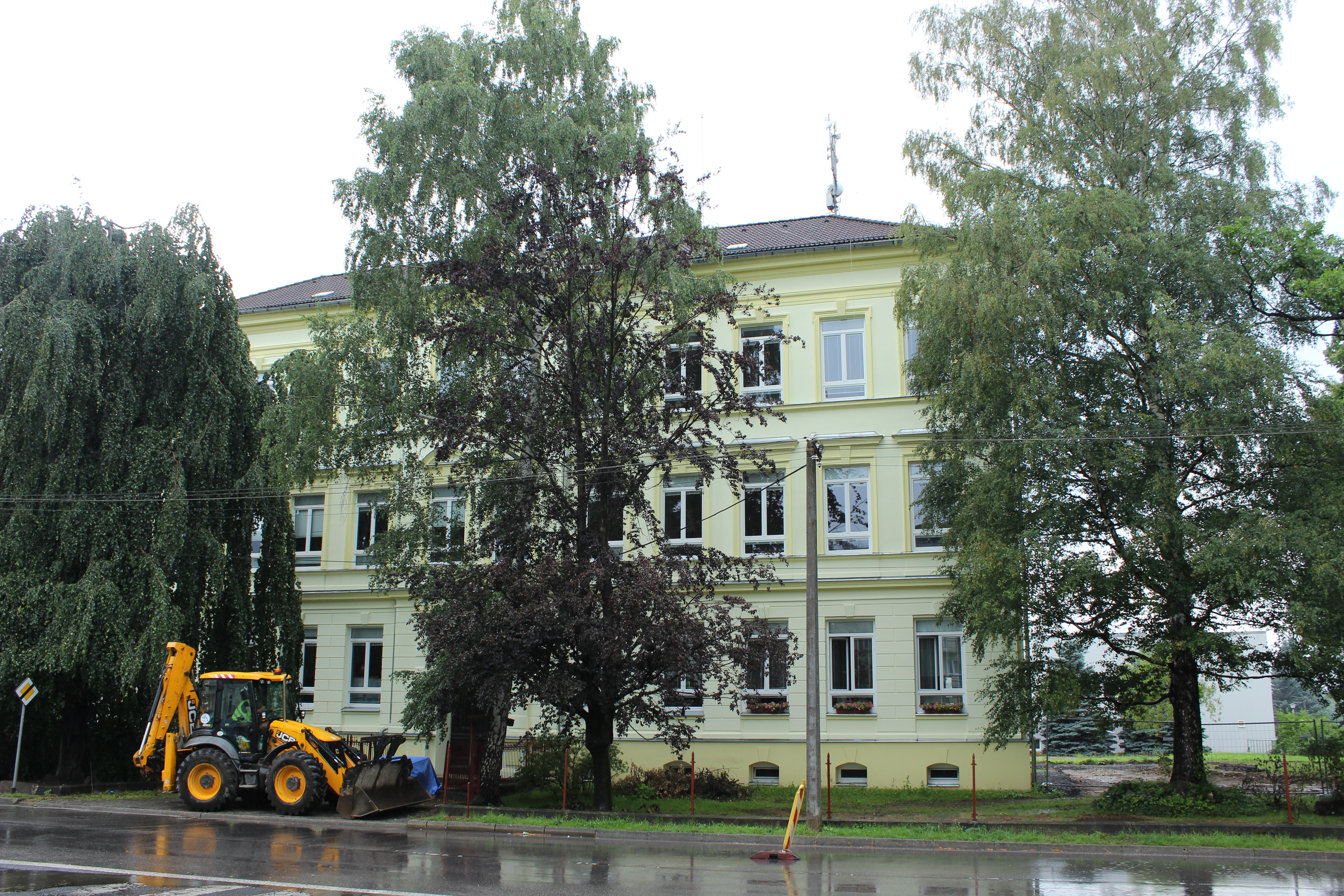 Budova základní školy v Hejnicích, v Lázeňské ulici.